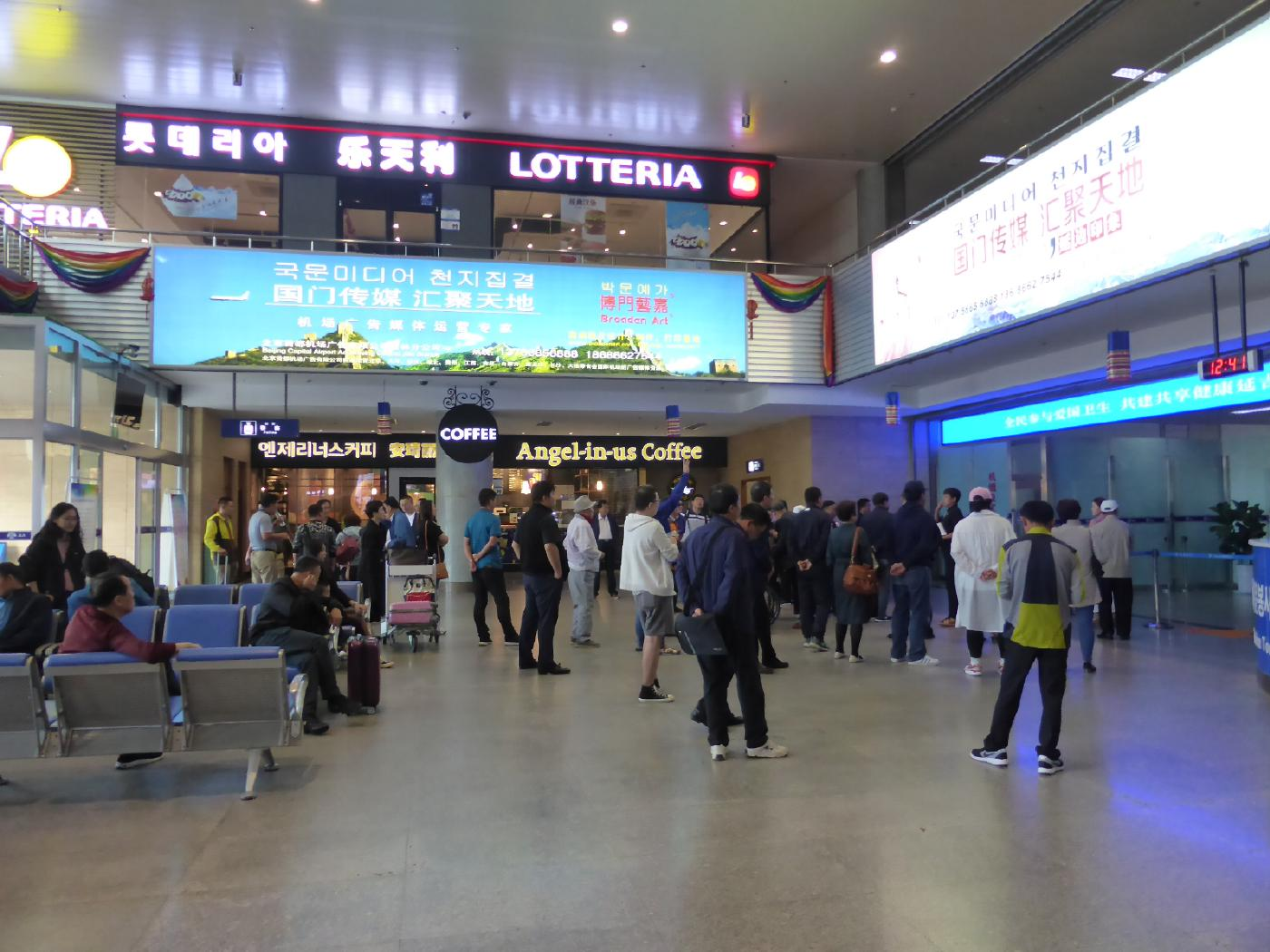 両店ても韓国資本の2Fロッテリアと1FのAngel_in_us